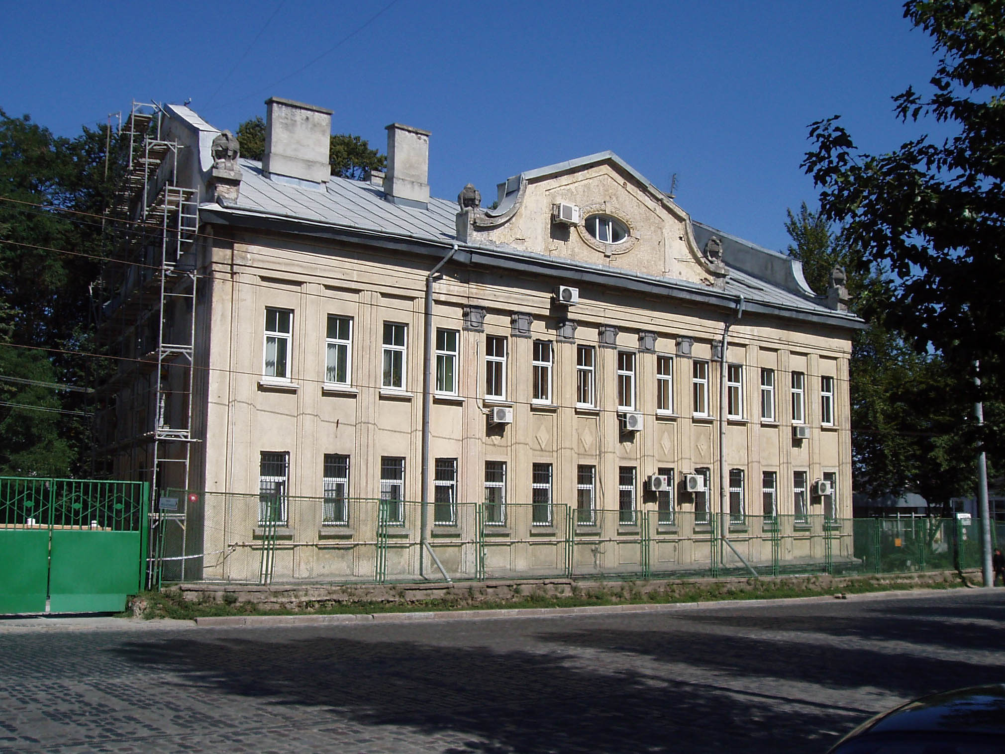 Будинок № 132 на вулиці Городоцькій у Львові.